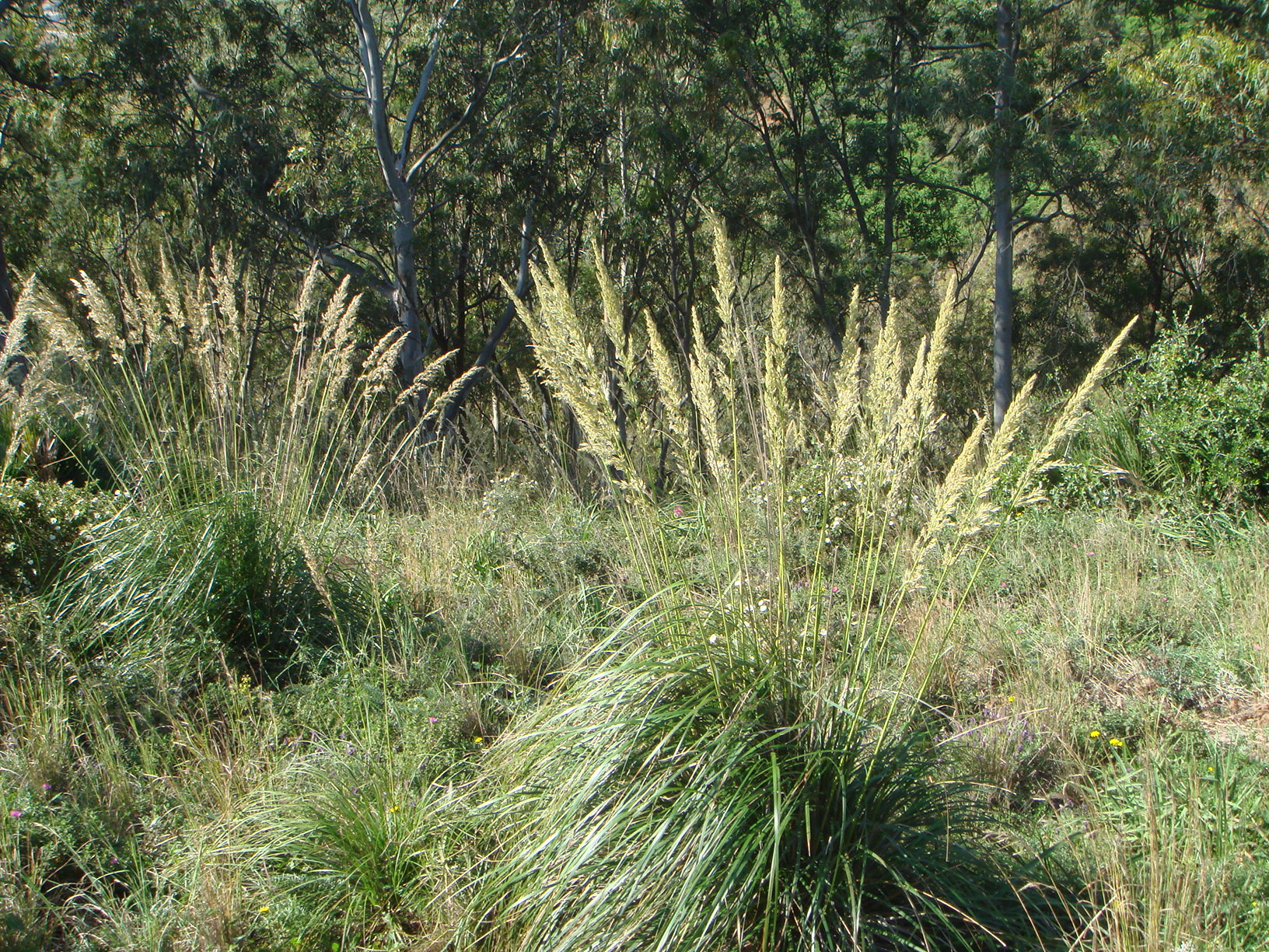 Ampelodesmos mauritanicus, Ceuta, España